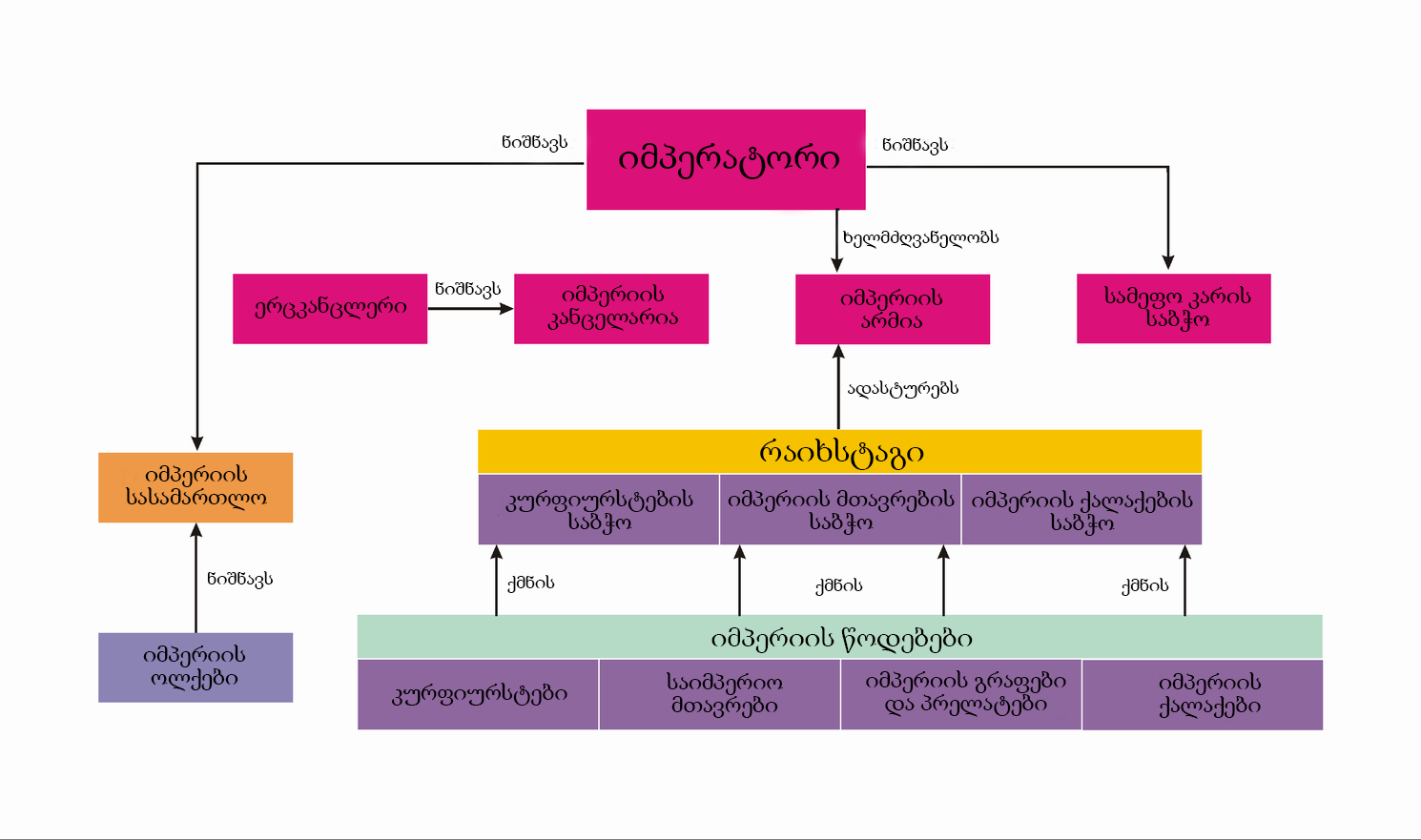 Insitutionen des Heiligen Römischen Reiches